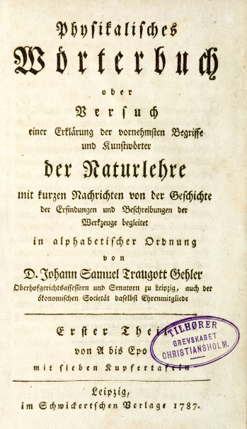 Titelblatt des Phyicalischen Wörterbuchs von Johann Samuel Traugott Gehler